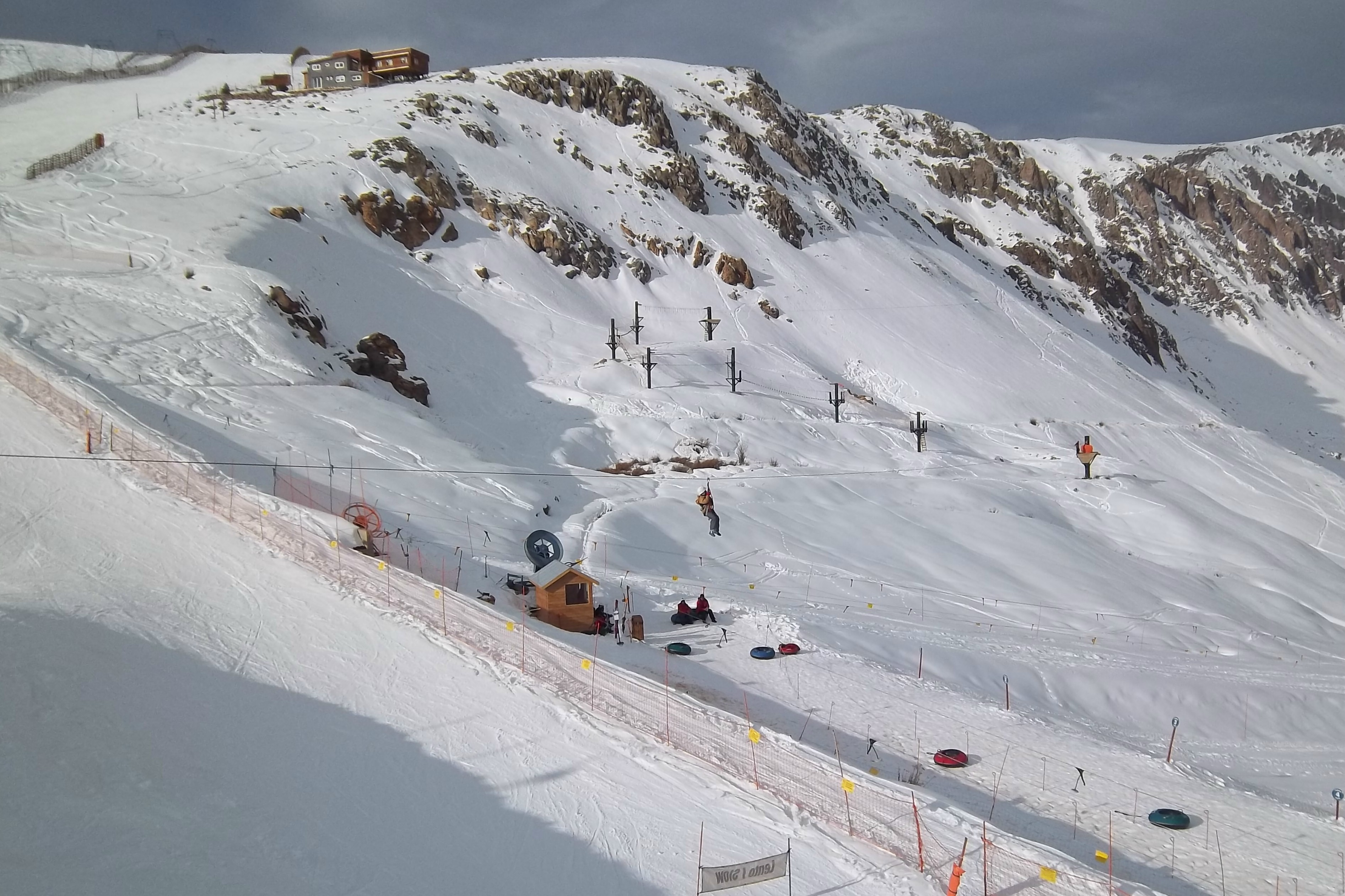 Tirolesa en el centro de esquí Farellones, comuna de Lo Barnechea, Región Metropolitana, Chile.